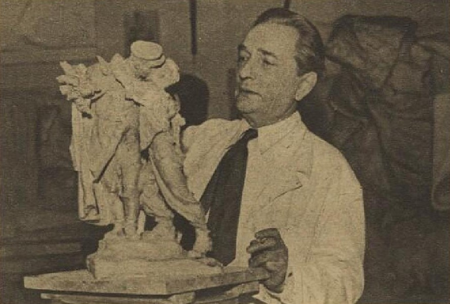 Karel Pokorný (1891-1962), český sochař a vysokoškolský pedagog